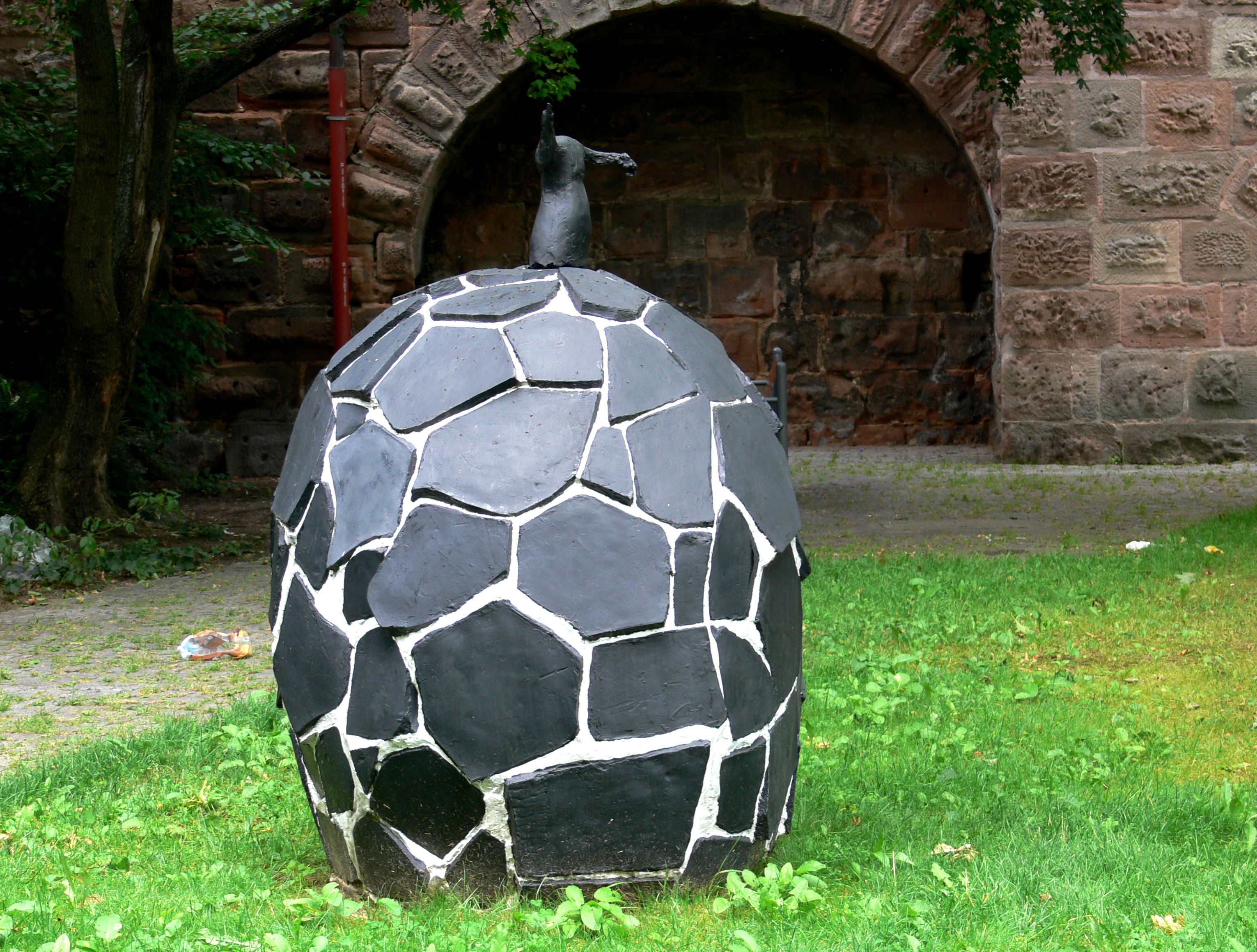 Skulpturengarten Nürnberg (Zwinger der Frauentormauer) Horst Münch: Der Däne (von Nürnberg), 1995–2004